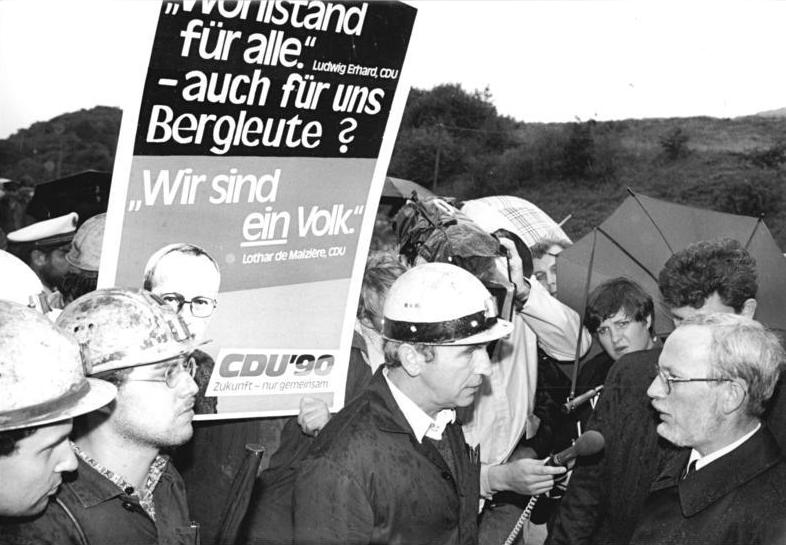 ADN- Ralf Hirschberger 21.9.90 Eisenach: Bergleute der Fluß- und Schwerspat GmbH aus dem thüringischen Trusetal übergaben Premier Lothar de Maiziere eine Petition, in der u.a. gleiche Regelungen für alle Bergleute bei Abfindungen und Umschulungsmaßnahmen gefordert werden. Ministerpräsident de Maiziere hatte in Eisenach symbolisch einen Teilabschnitt der Eisenbahnstrecke Warthe-Gerstungen übergeben.